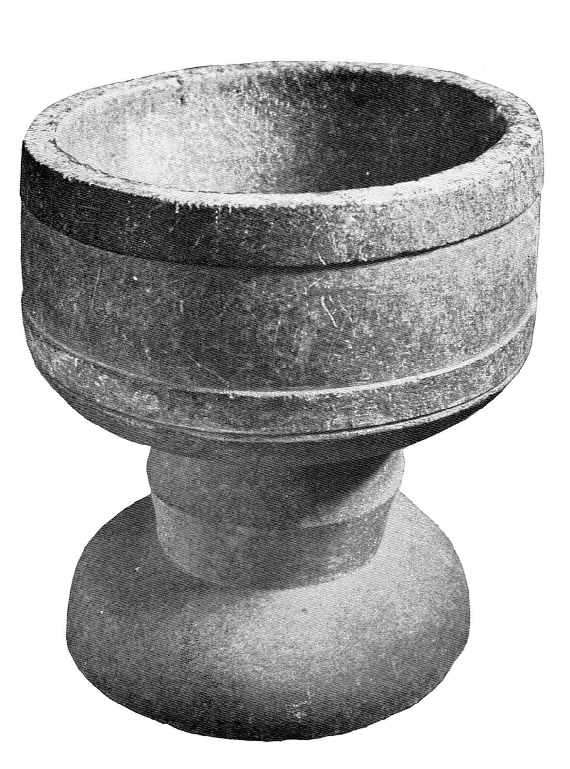 Järbo kyrka, Dalsland. Dopfunt.